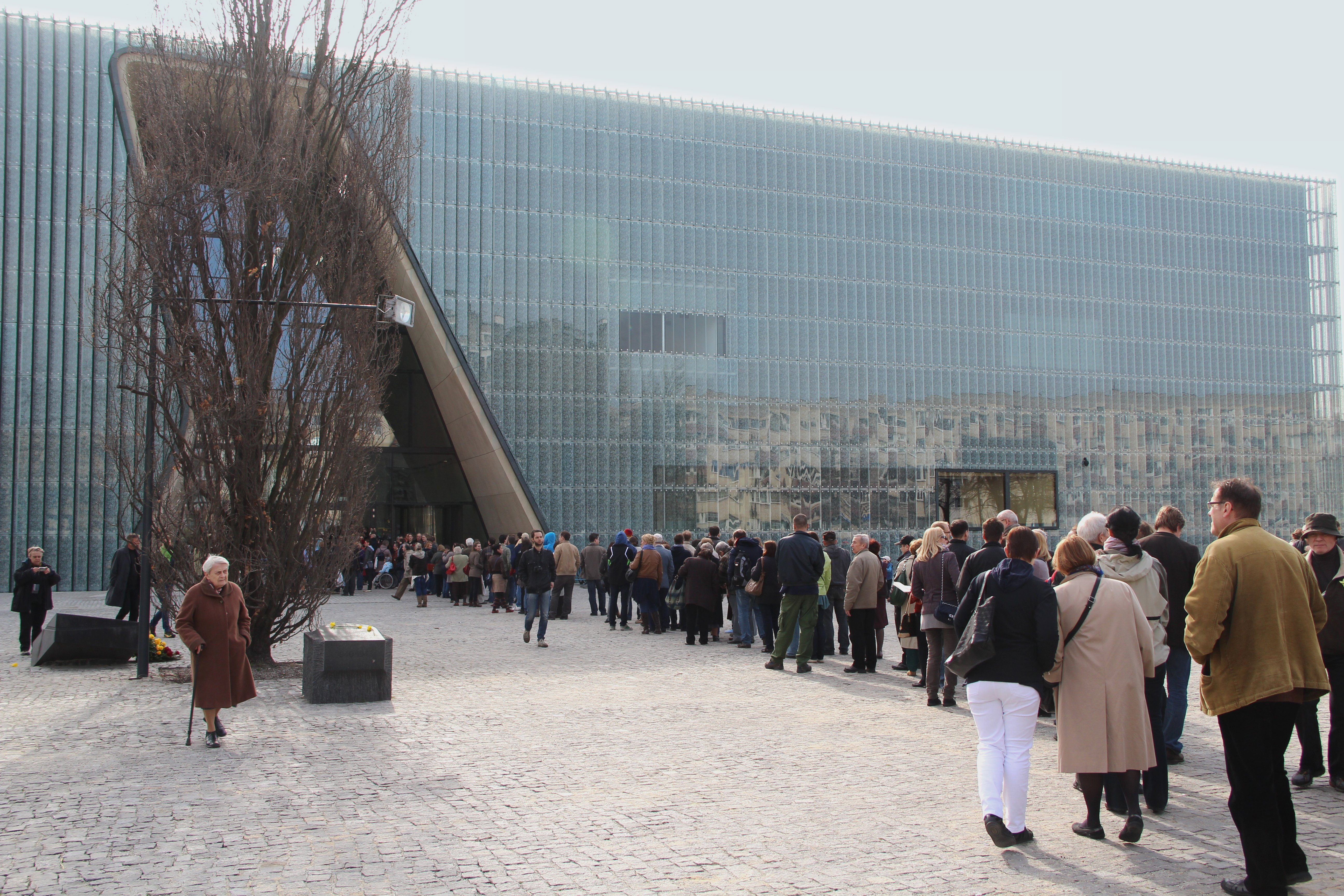 Jüdisches historisches Museum Warschau, Frühling 2013